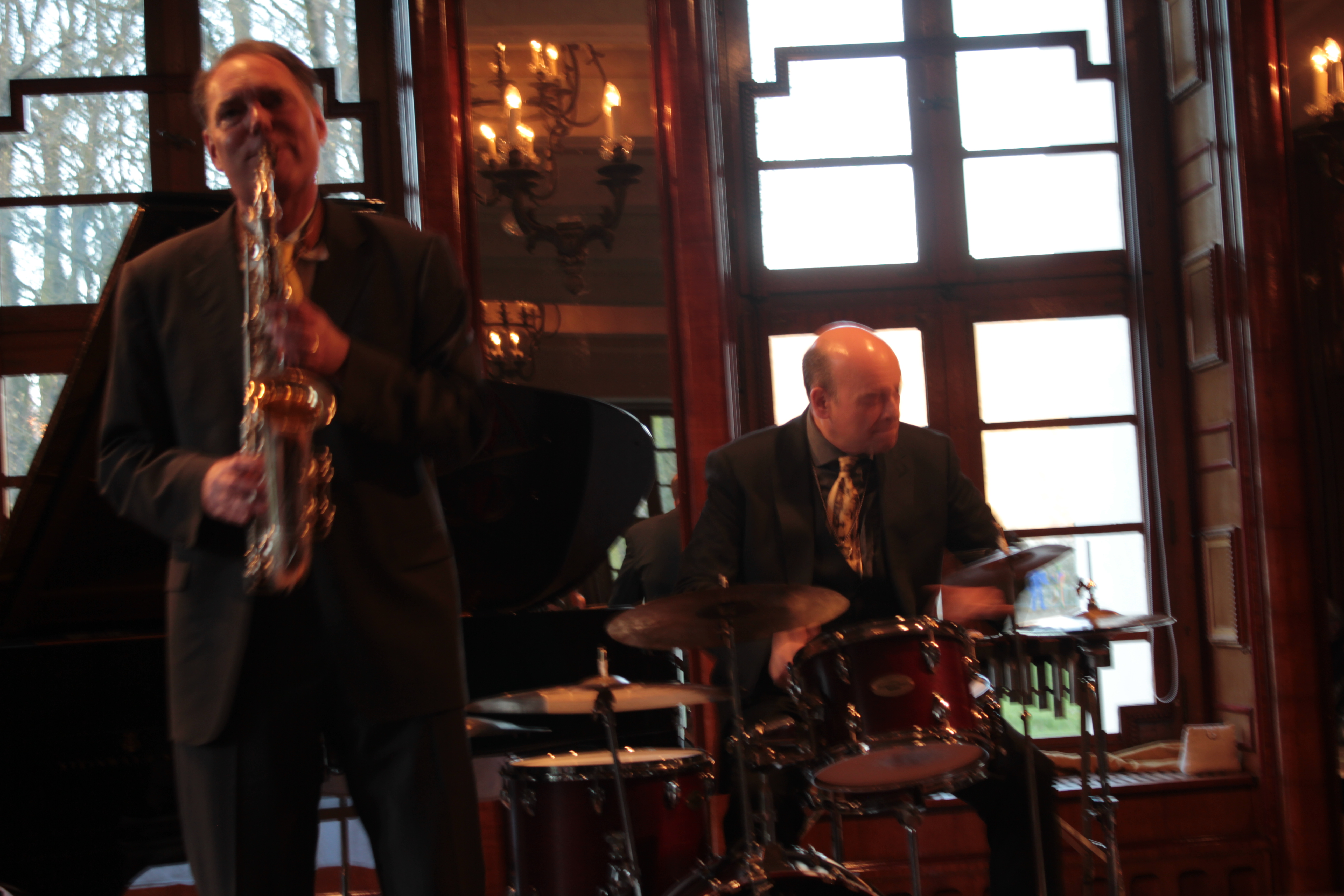 Frank Roberscheuten und Martin Breinschmid bei einem Auftritt der Three Wise Men im Schloss Burg Namedy am 24. März 2019